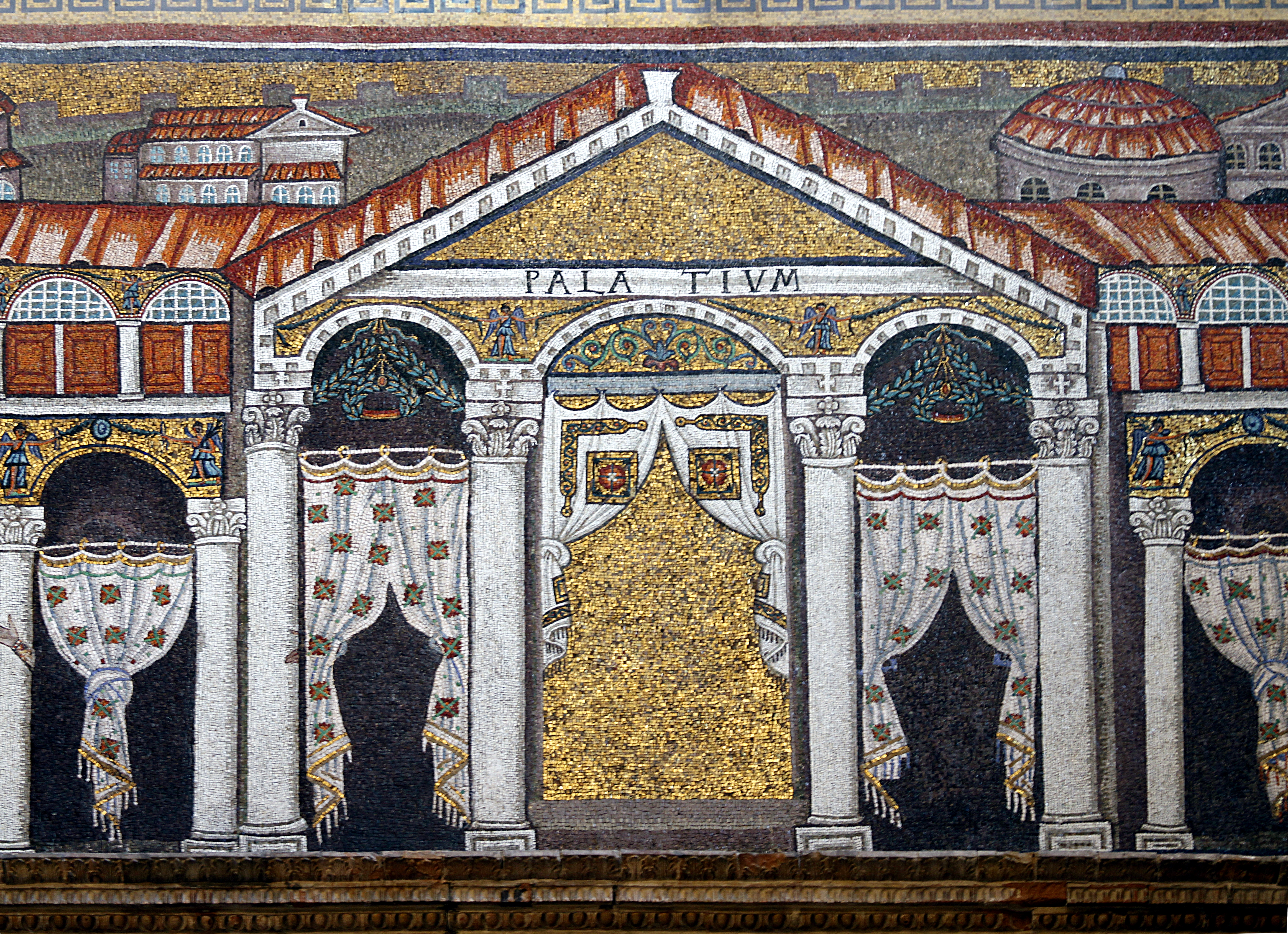 Theodoric's Palace - Sant'Apollinare Nuovo - Ravenna